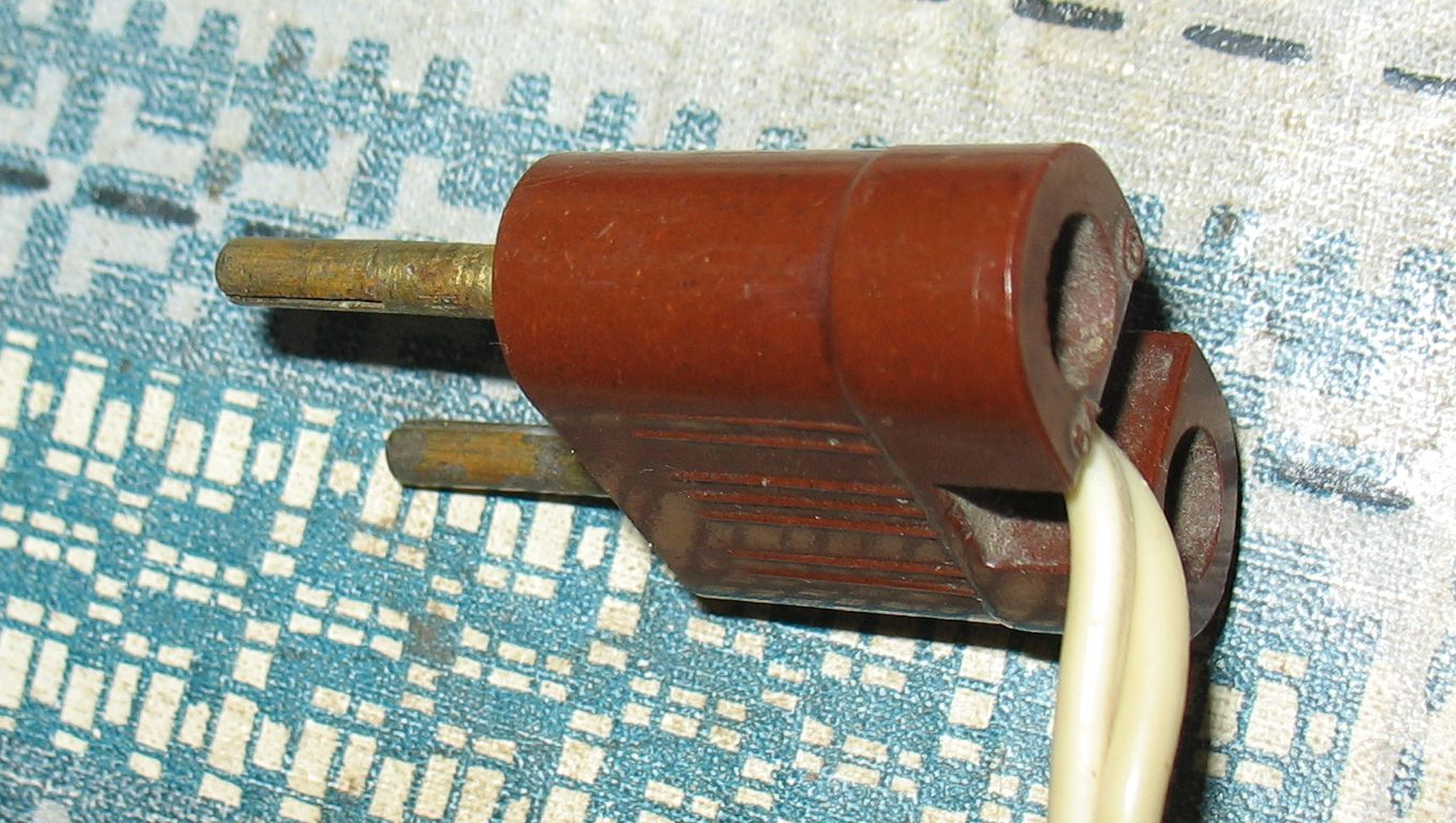 Советская вилка с возможностью подключения "стопкой"